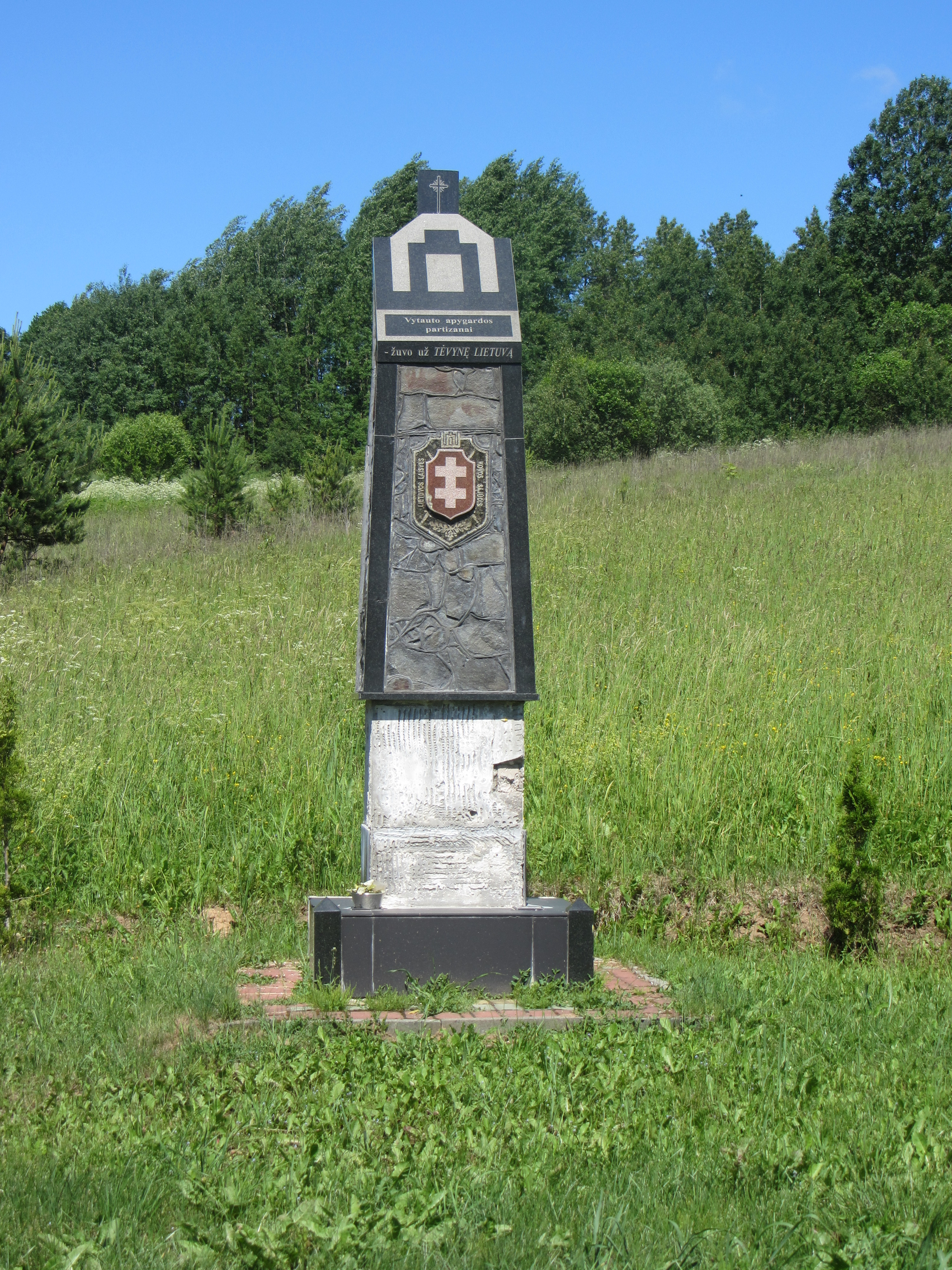 Suvieko sen., Lithuania